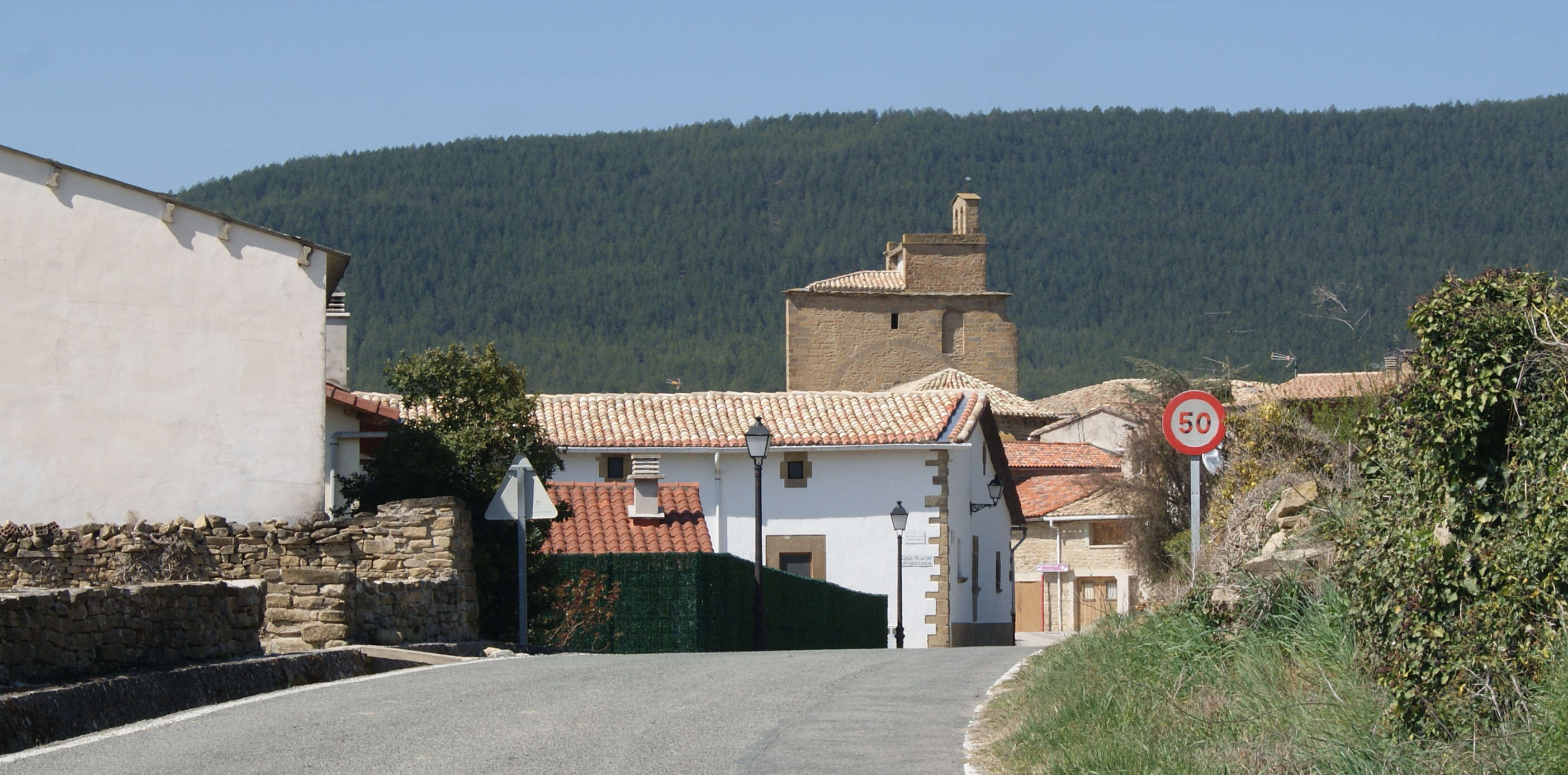 Leache (Navarra)